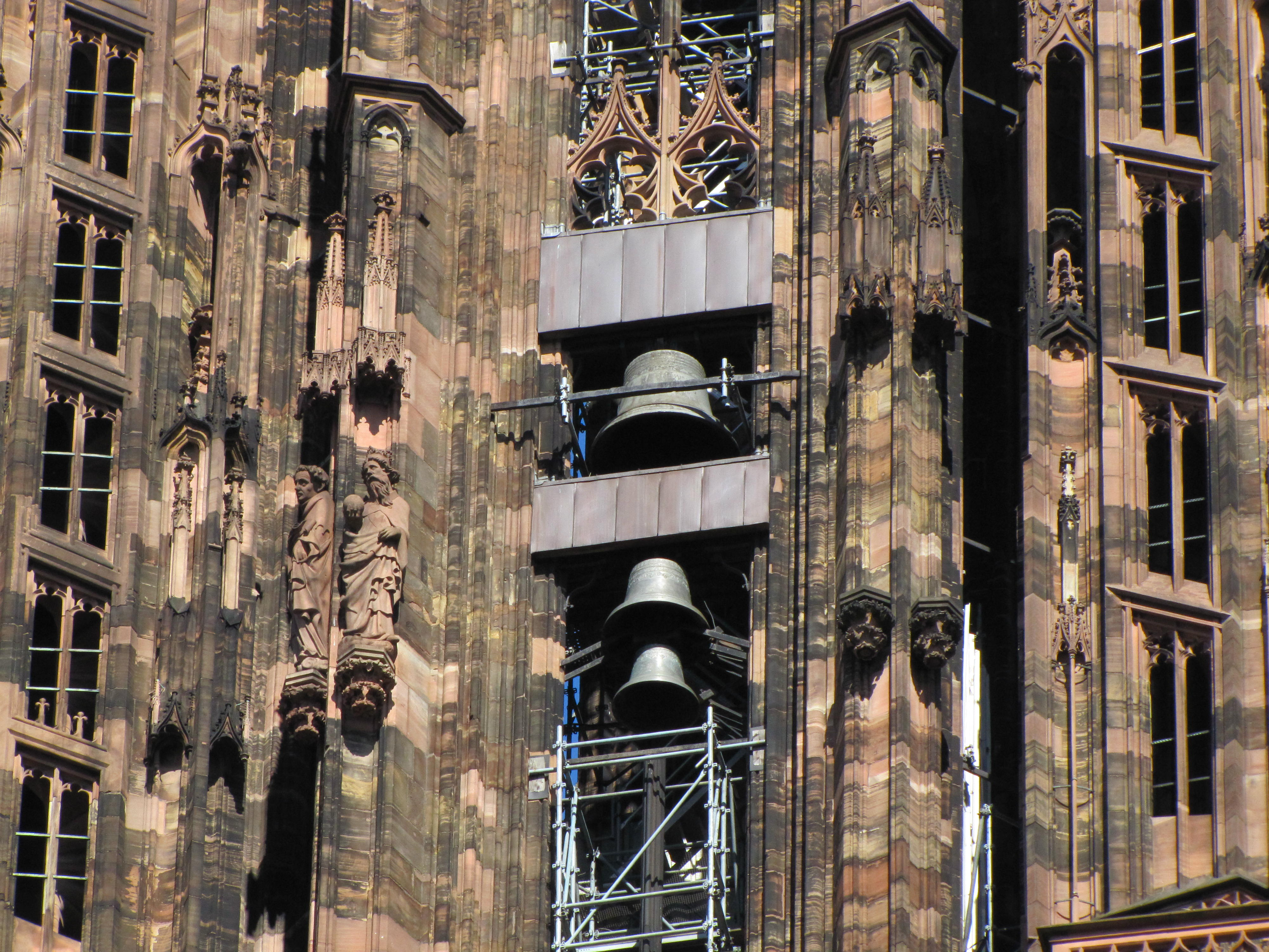 Alsace, Bas-Rhin, Cathédrale Notre-Dame de Strasbourg (PA00085015). Façade occidentale, Cloches visibles